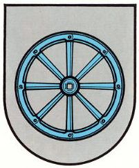 Wappen der Ortsgemeinde Wahnwegen in Rheinland-Pfalz